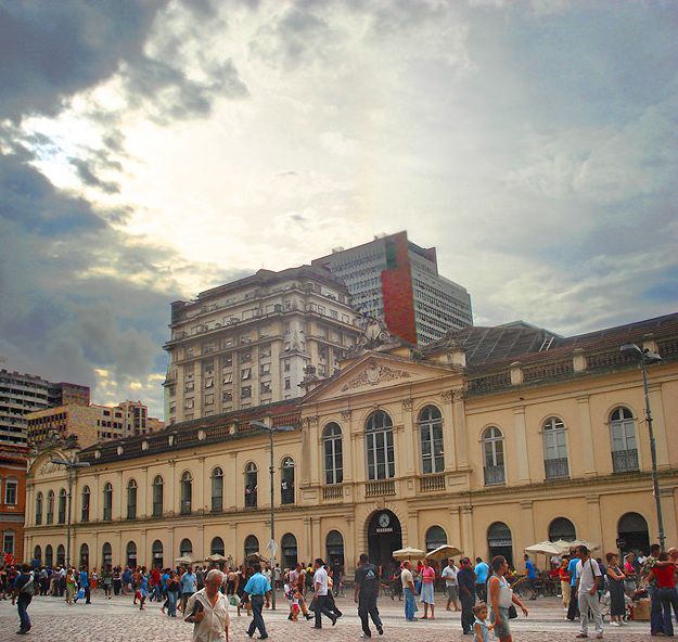 Vista parcial do Mercado Público e da Praça XV, Porto Alegre, Brasil.